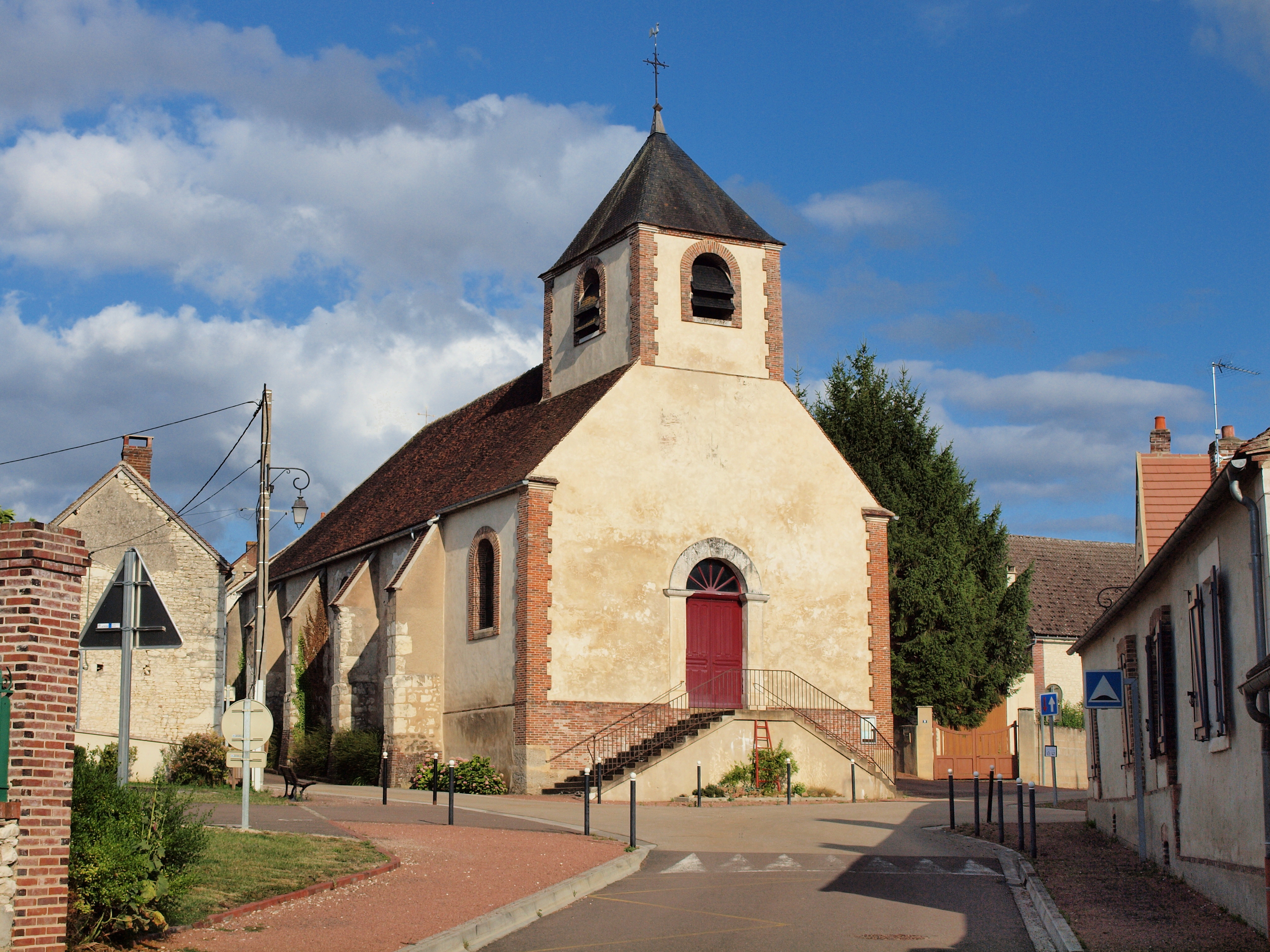 Villemer (Yonne, France)